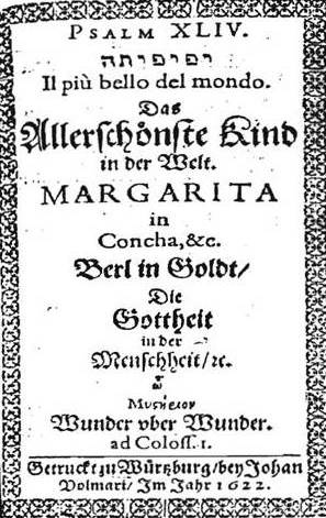 PSALM XLIV. יפיפית מ Il più bello del mondo. Das Allerschönste Kind in der Welt. MARGARITA in Concha, &c. Berl in Goldt/ Die Gottheit in der Menschheit, ὦ Μυστήριον Wunder vber Wunder ad Coloss. 1. Gedruckt zu Würzburg/ bey Johan Volmari/ Im Jahr 1622 Vgl. Friedrich Spee: Die anonymen geistlichen Lieder vor 1623, Berlin 1979, S. 156 ( , ID 20005702380)